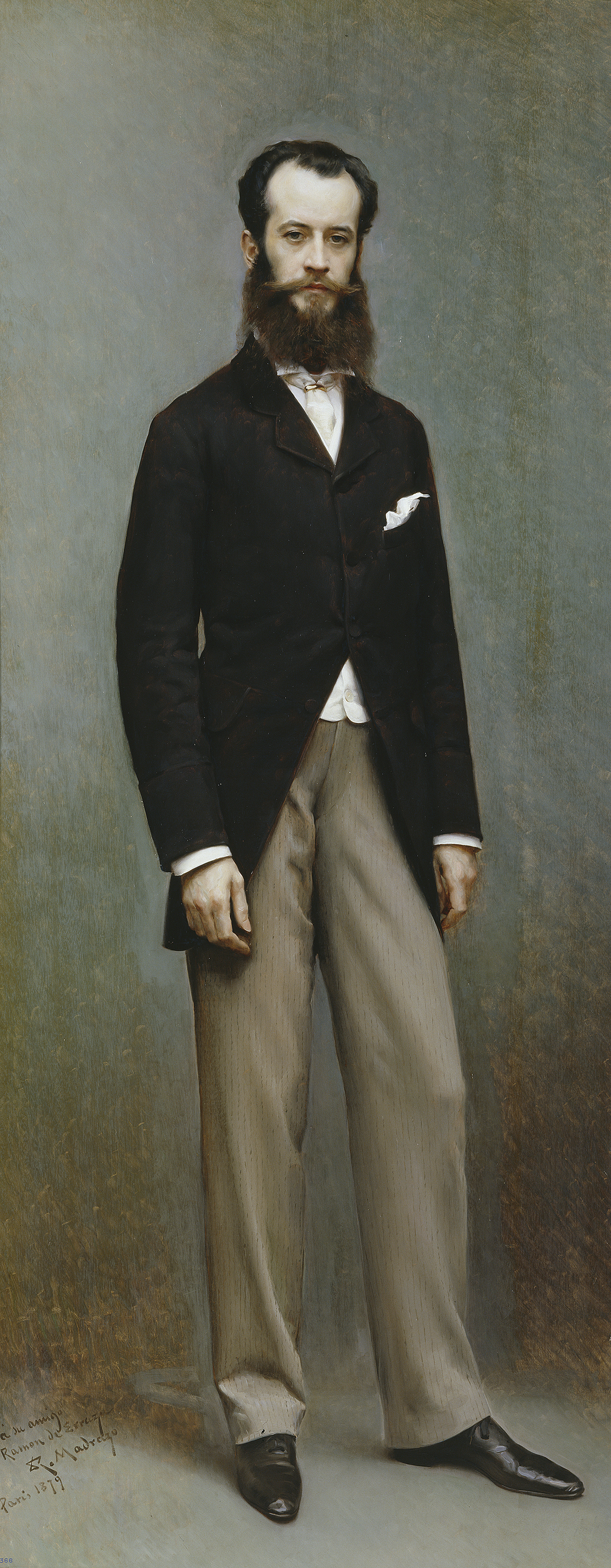 Retrato de cuerpo entero del empresario y coleccionista español Ramón de Errazu (1840-1904), que fue amigo personal y cliente de Madrazo, a quien compró y encargó numerosas obras. La sencillez de la composición, calificada como “velazqueña” por su parecido con algunas obras del pintor Diego Velázquez, y el profundo conocimiento que el artista tenía del carácter del personaje, contribuyen a dar una total naturalidad y elegancia al conjunto del modelo, en parte idealizado, por la verticalidad y estrechez del formato utilizado con profusión entre los retratistas franceses del último tercio del siglo XIX.